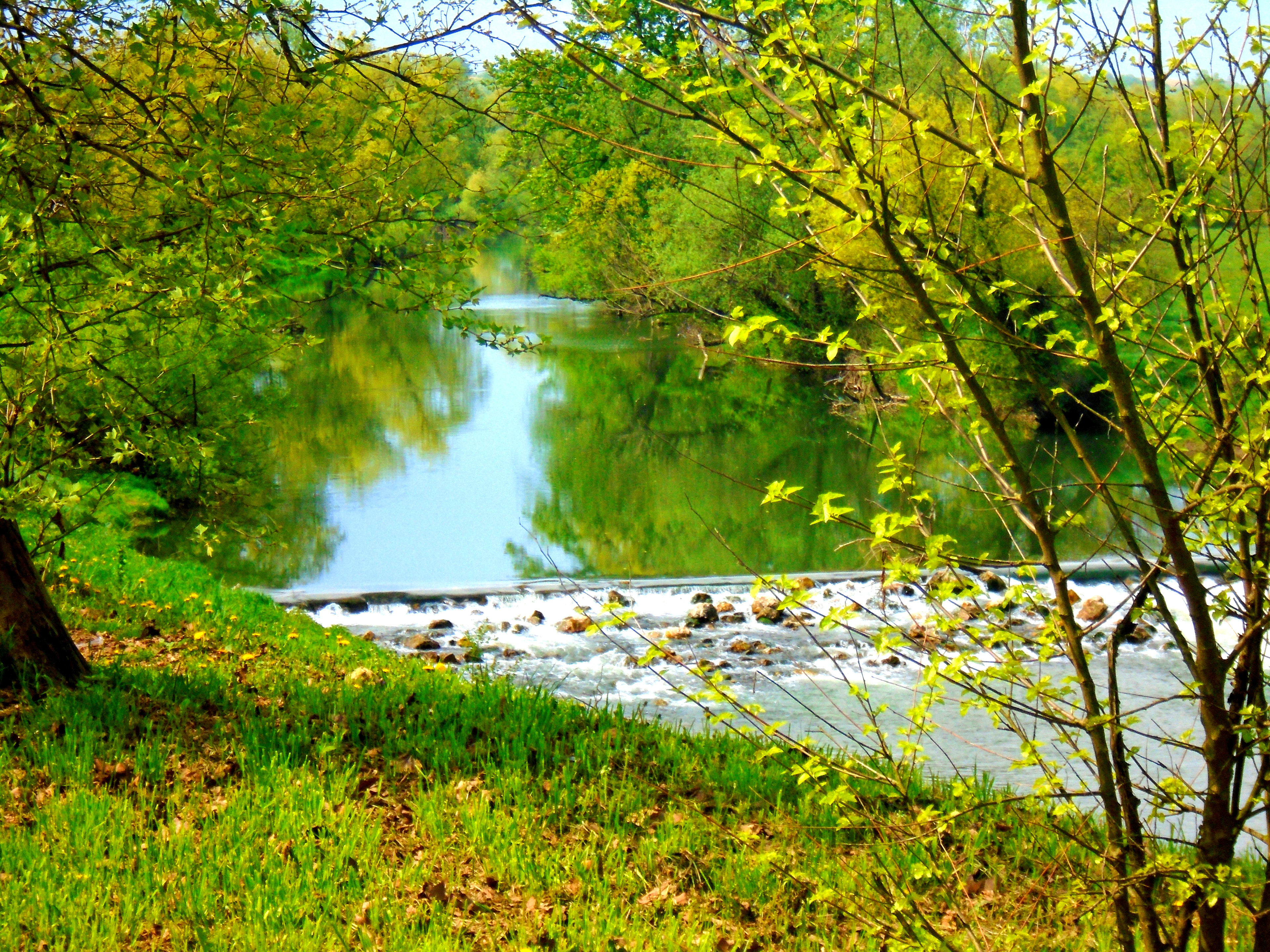 PUP036